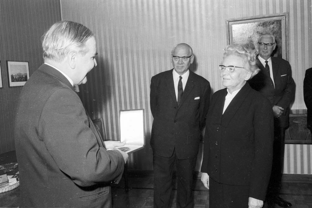 Der Präsident der Industrie- und Handelskammer zu Kiel (IHK) Konsul Heinz Seibel (1.v.l.) ehrt Stadträtin Toni Jensen (3.v.l.) für Ihre Verdienste um das berufliche Bildungswesen.